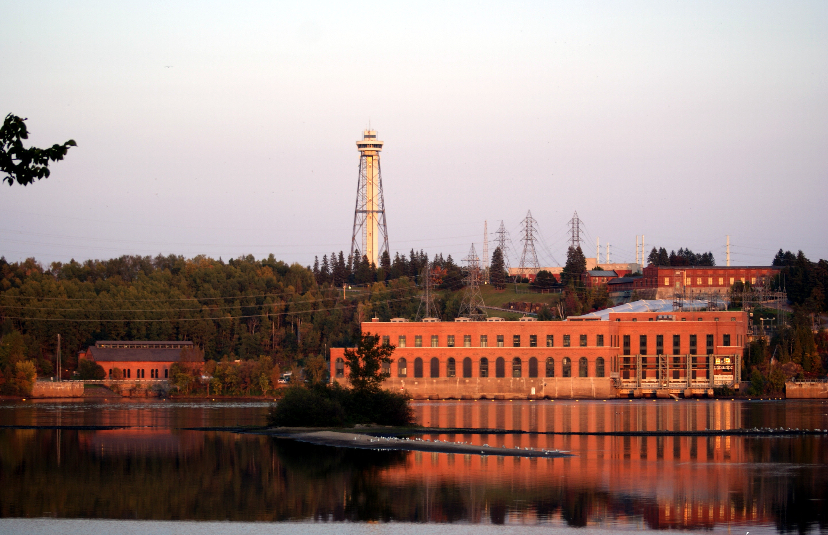 Sur la gauche de la photo, une partie du site de l'ancienne aluminerie, soit l'ancienne centrale hydroélectrique (bâtiment 1) de l'aluminerie. Au centre, la tour de la Cité de l'énergie. À droite, la centrale et la prise d'eau de l'aménagement hydroélectrique Shawinigan-2 d'Hydro-Québec. À l'avant-plan, la baie de Shawinigan.